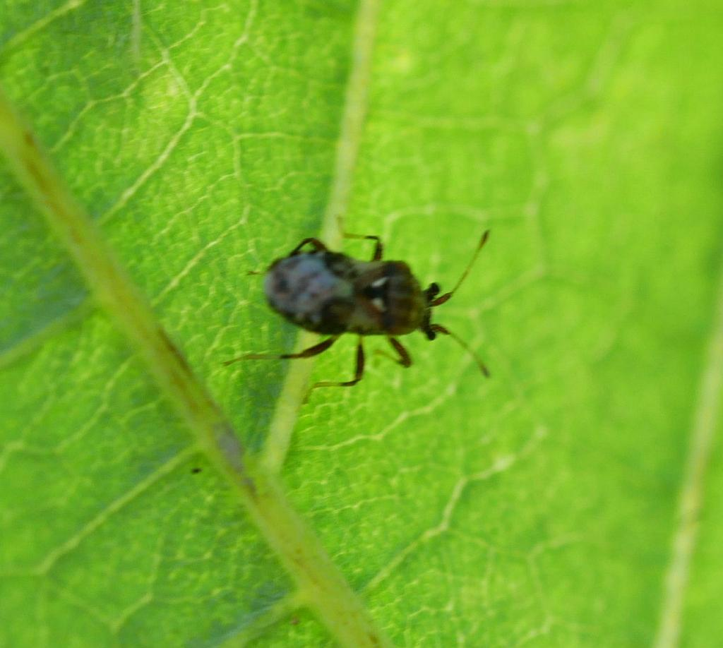 2019/09/09 和歌山県田辺市：Tanabe City. Wakayama Pref. Japan